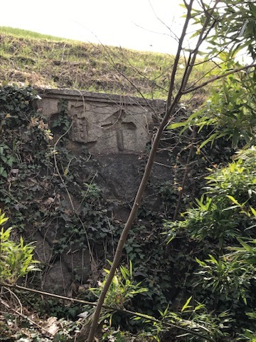 東淀川区にある樋門